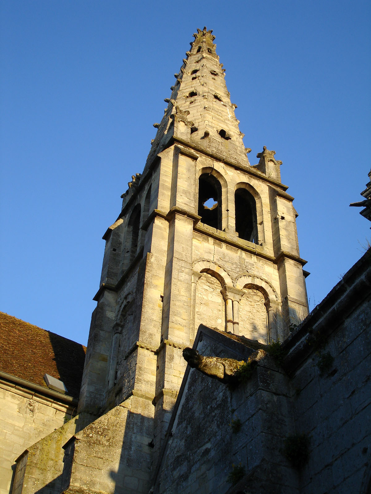 Tour romane de l'église Saint-Pierre à Senlis, Oise, France.